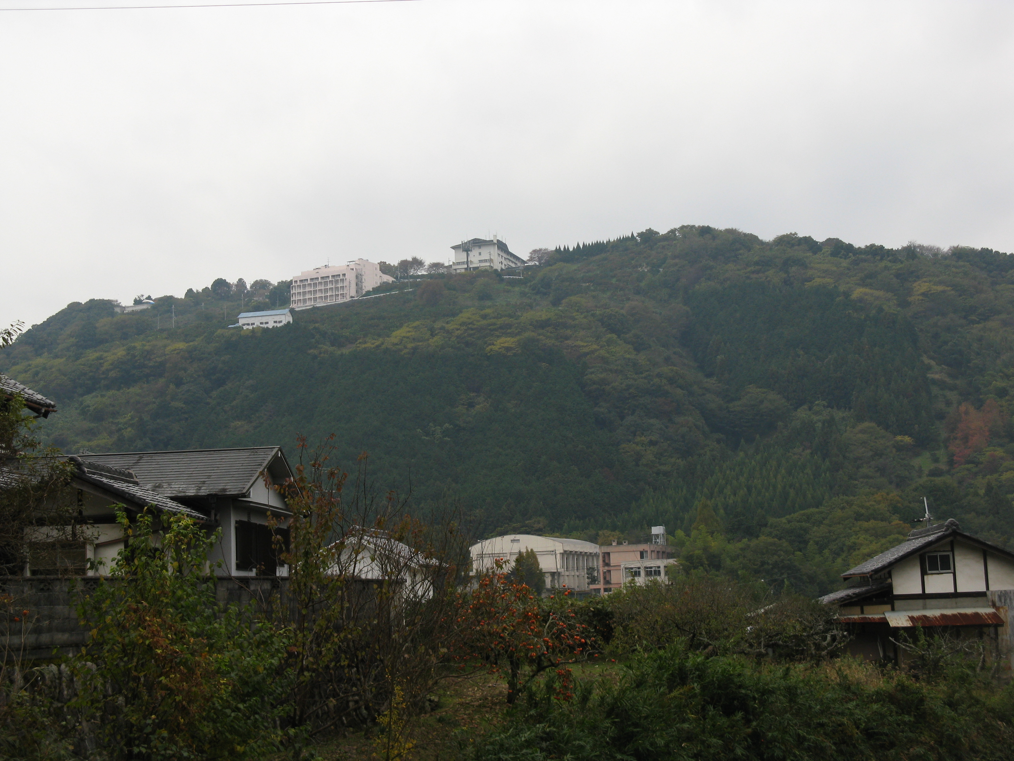 嶽山